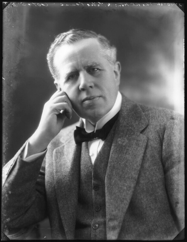 Lord Daryngton